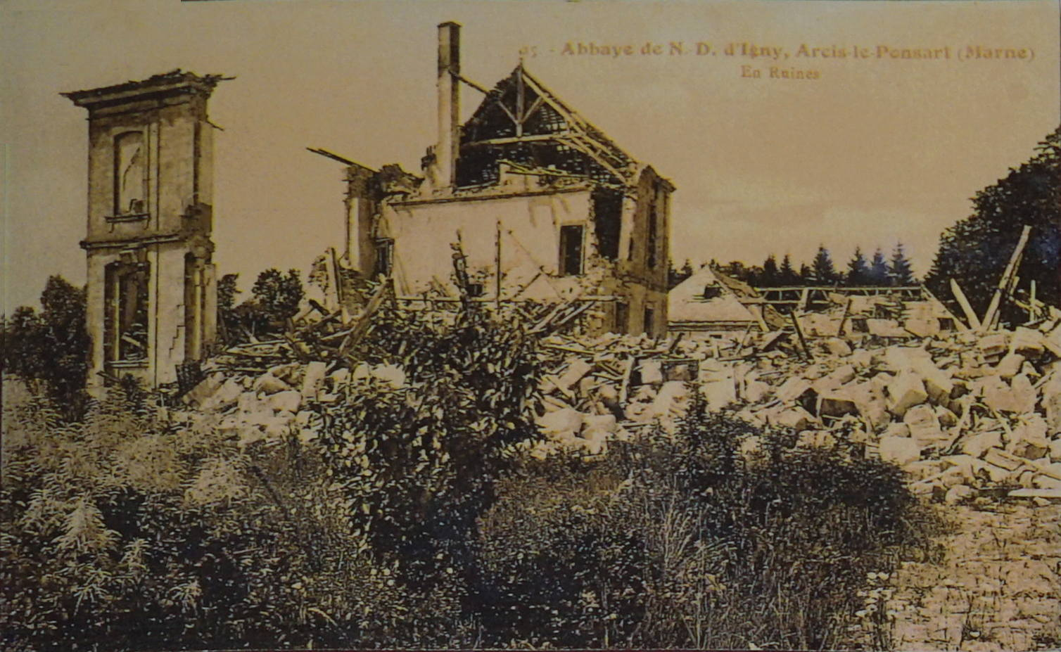 une vue de l'abbaye.